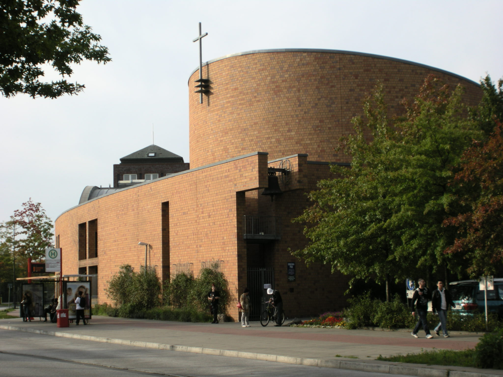 Hamburg-Neuallermöhe, kath. Edith-Stein-Kirche